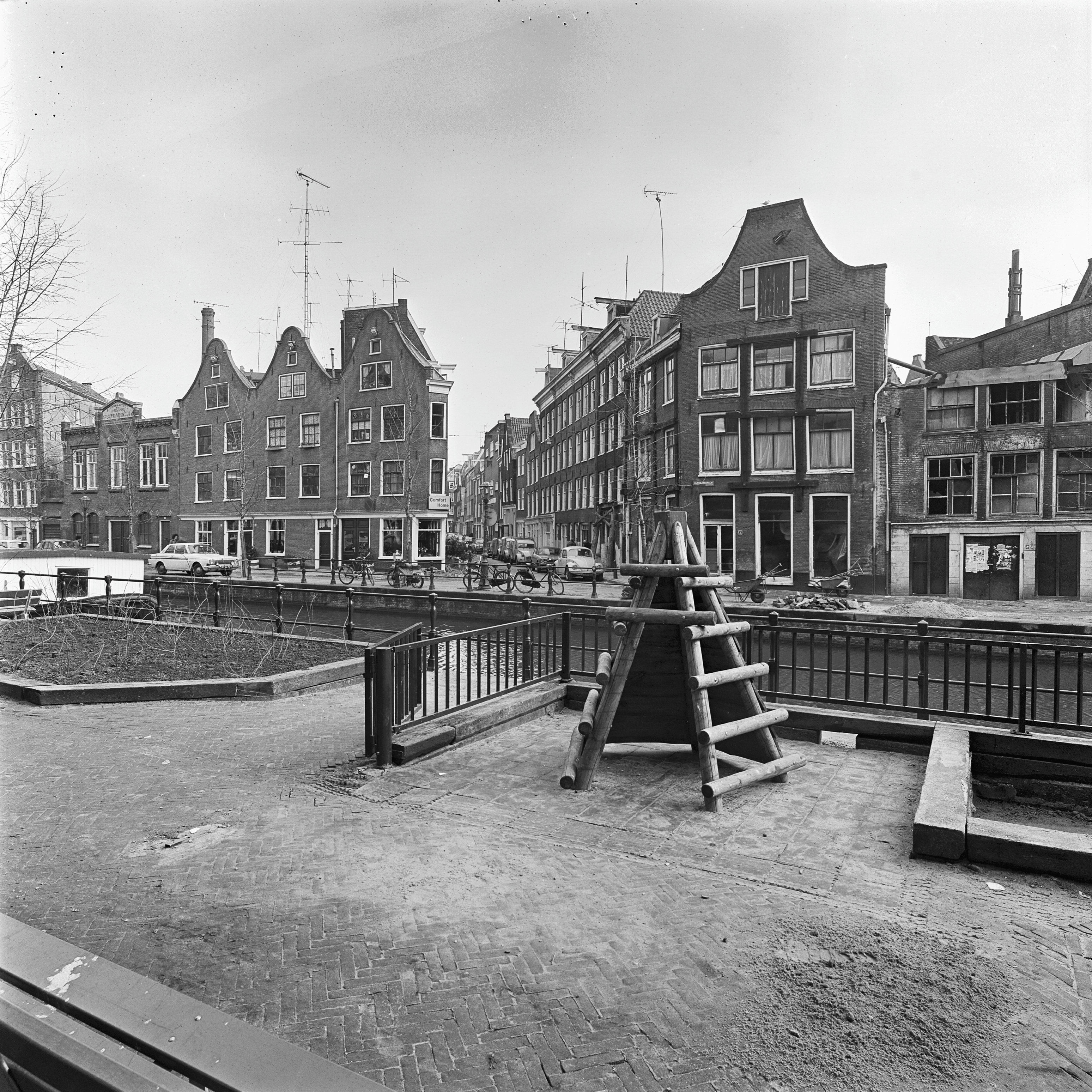 overzicht